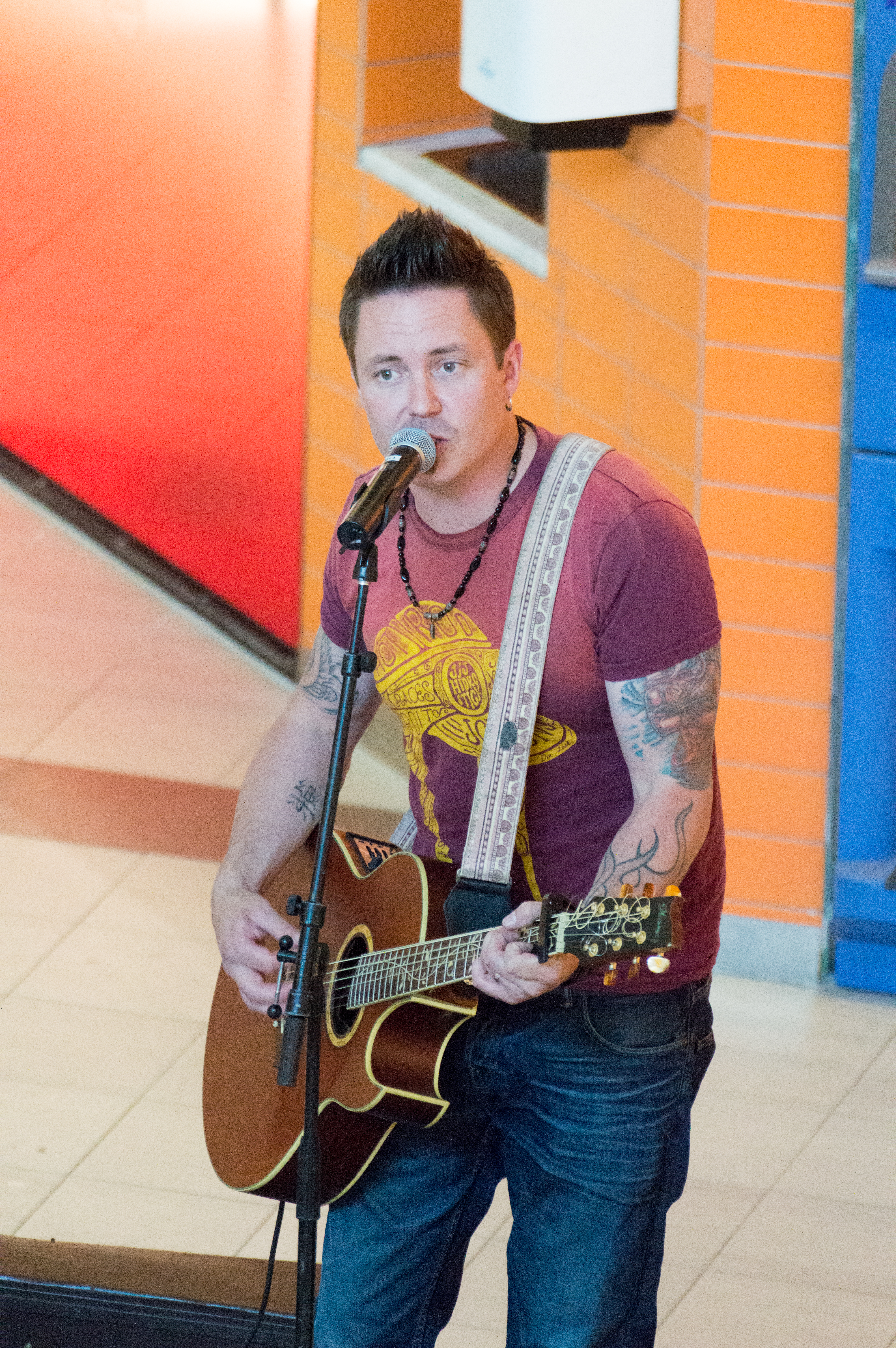 Mikko Sipola suomalainen laulaja